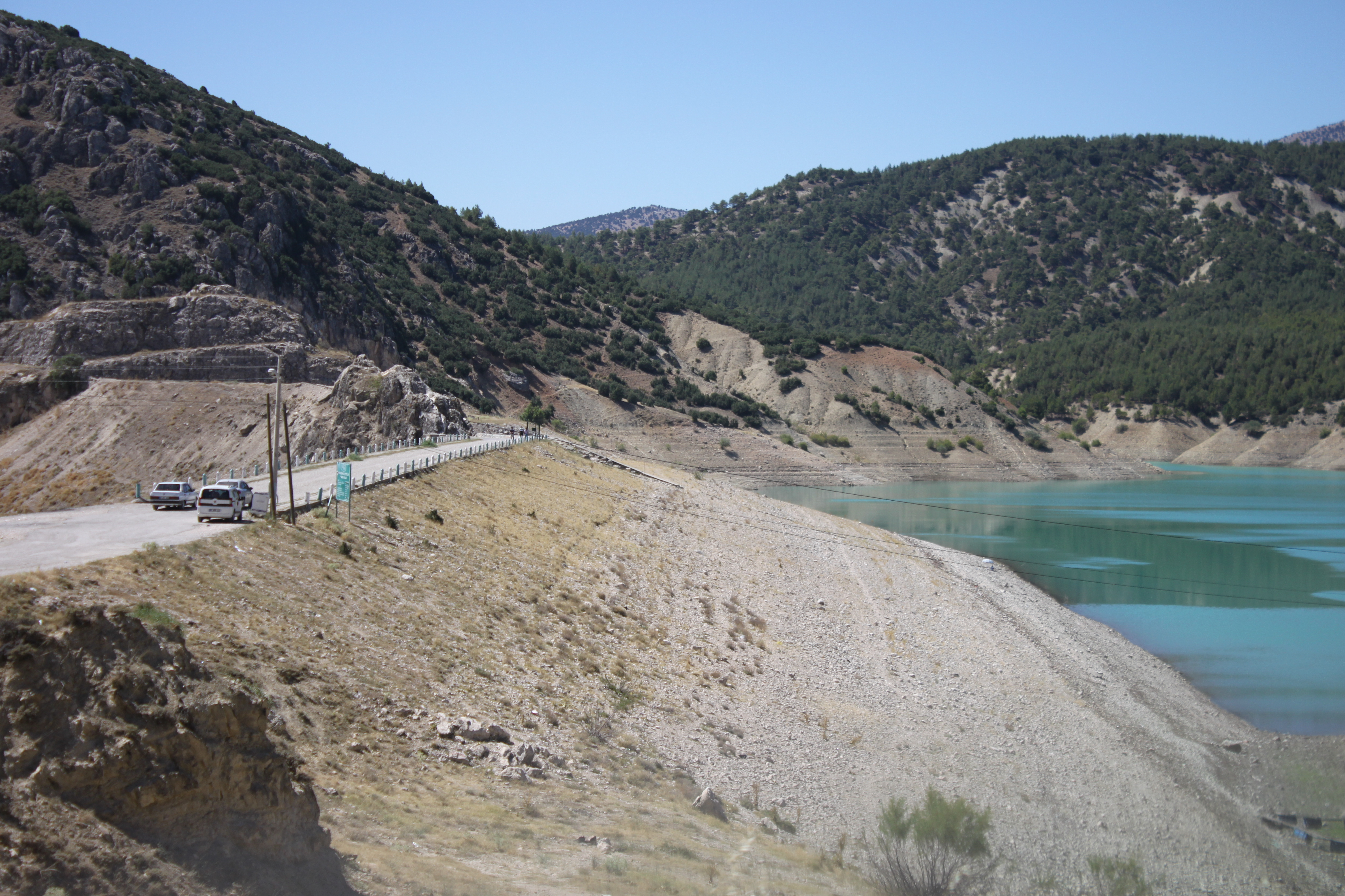 Der Damm des Korkuteli-Stausees im Westen der Stadt; Blick nach Süden